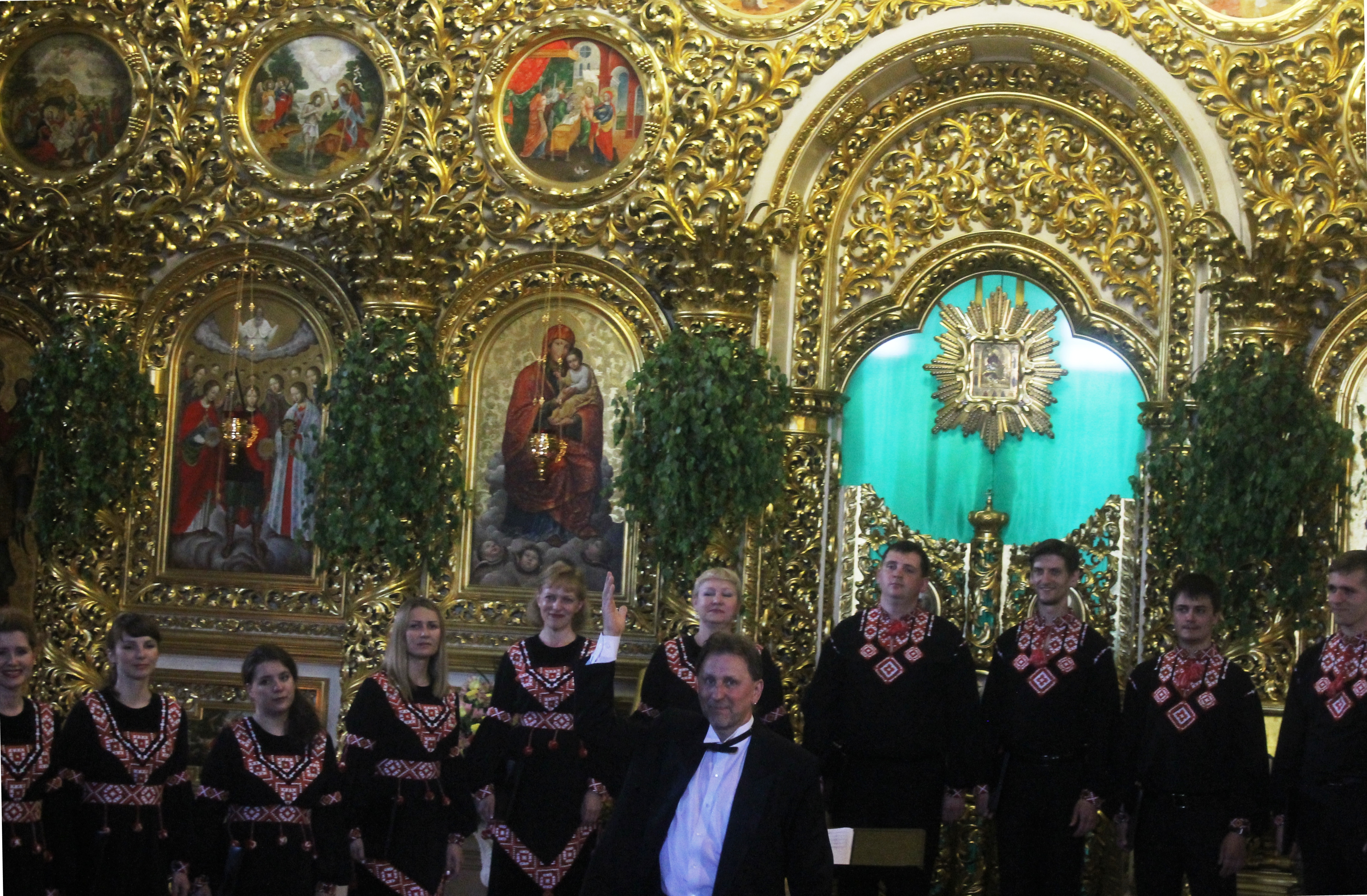 Хор "Київ". Диригент - Микола Гобдич. Фото з концерту у Михайлівському златоверховому (Київ)